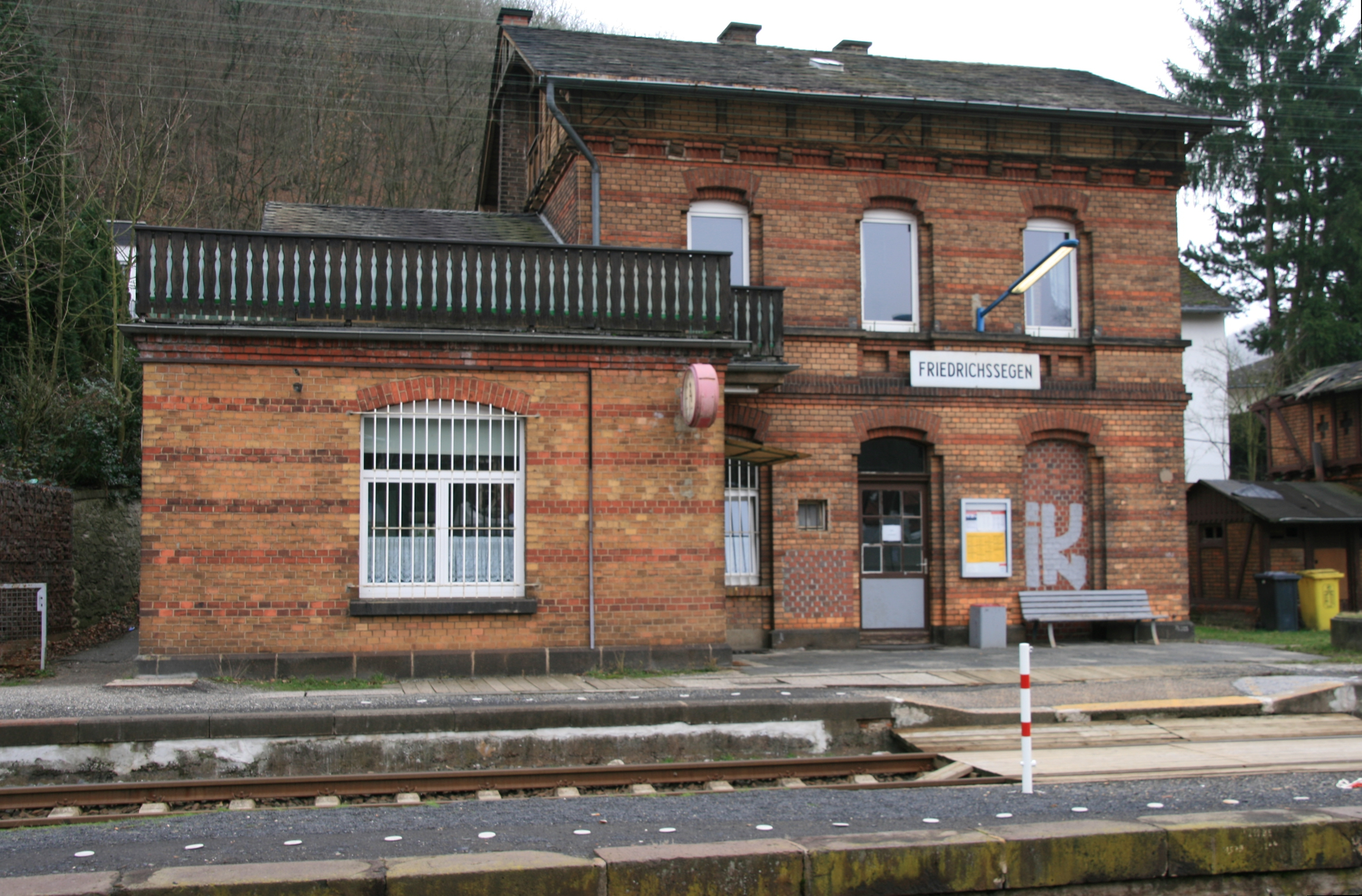 Bahnhof von Friedrichssegen, Orteil von Lahnstein, Rheinland-Pfalz. Denkmalgeschütztes Empfangsgebäude mit Lagerschuppen, Klinker und Fachwerk. Baubeginn war am 6. November 1883. Am 20. Mai 1884 wird die Station "FRIEDRICHSSEGEN" der Lahntal-Eisenbahn in Betrieb genommen. Die Gebäude des Bahnhofs wurden auf Kosten der Grubengesellschaft der Grube Friedrichssegen erstellt und haben 42.000 Mark gekostet. Der eingeschossiger Anbau stammt um 1900. Quelle: Chronik des Bergbaudorfes Friedrichssegen auf Rhein-Lahn-Info